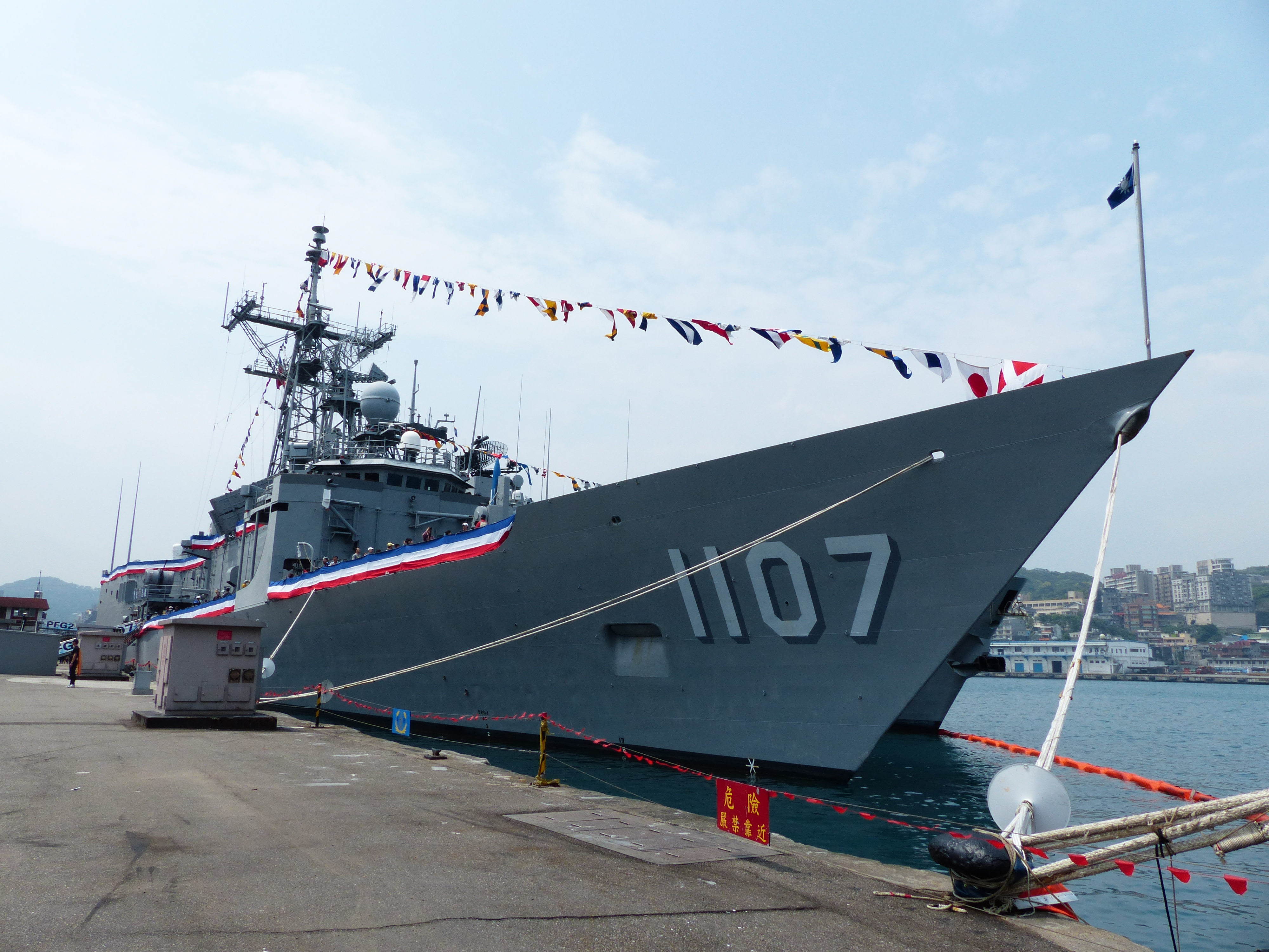 海軍103敦睦遠航訓練支隊訪問基隆，停泊東五號碼頭的巡防艦子儀（PFG2-1107）。